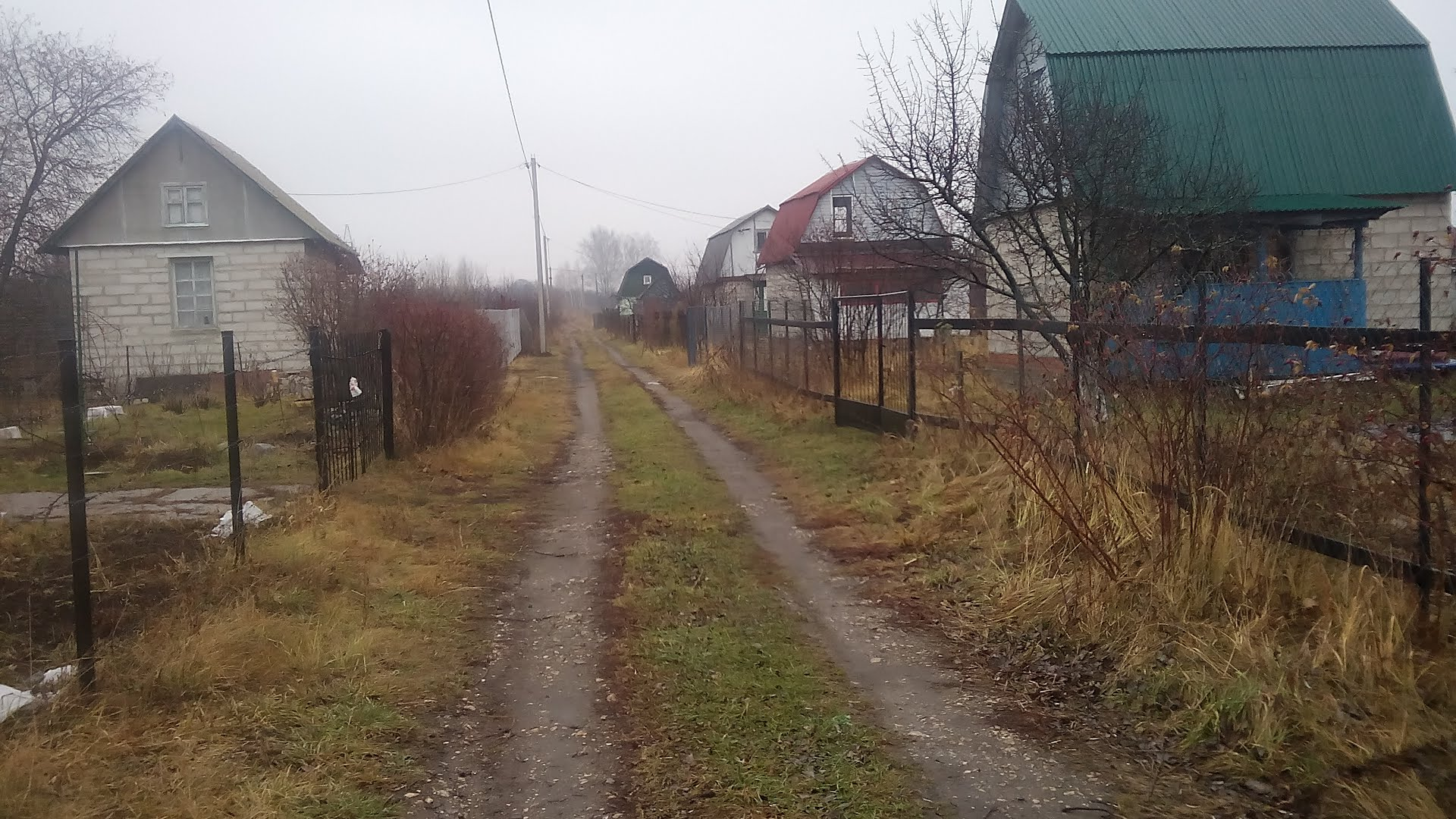 СНТ «Луч», Козловка, Рыбновский район, Рязанская область